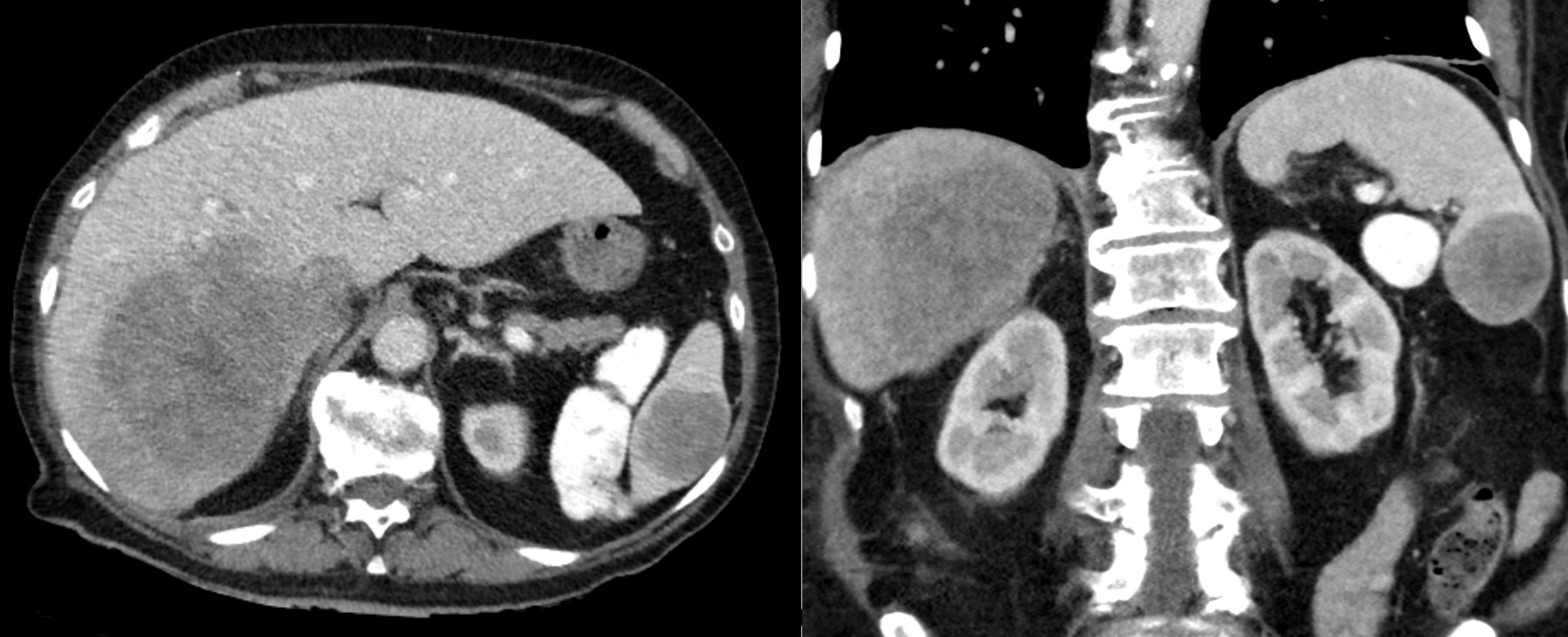 Große hypodense Raumforderungen in Leber und Milz, die sich in einer Biopsie der Leber als blastäres Non-Hodgkin-Lymphom der B-Zell-Reihe herausstellten. Computertomographie axial und coronar.